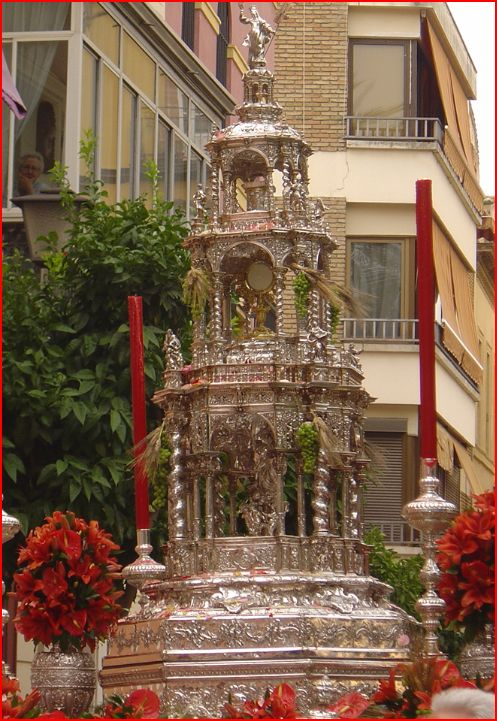 Custodia procesional o de asiento de la iglesia de Santa María Magdalena de Sevilla, (España). Fue realizada por el orfebre Juan Laureano de Pina y terminada en 1692.